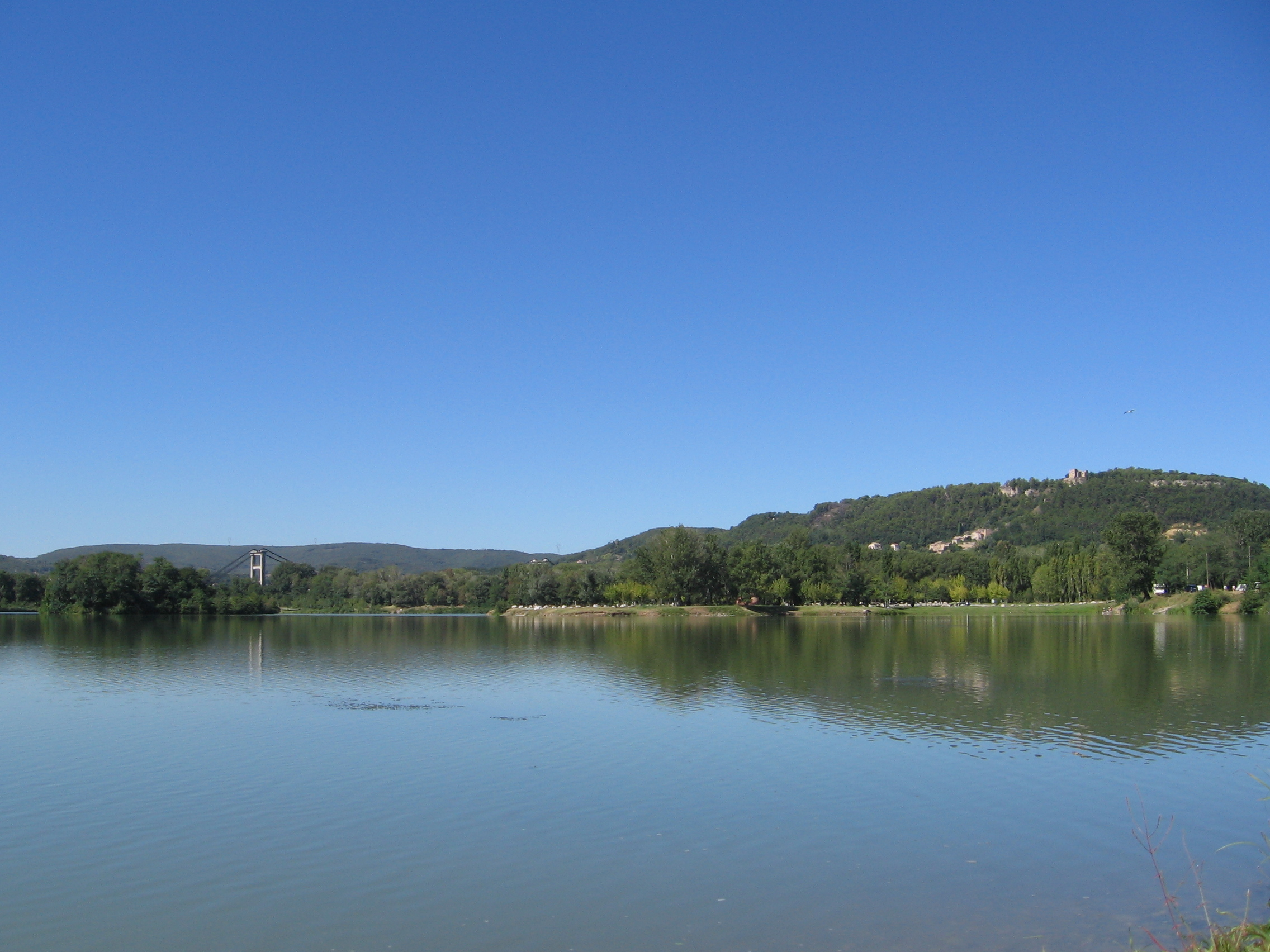 Base de Loisirs, Montelimar